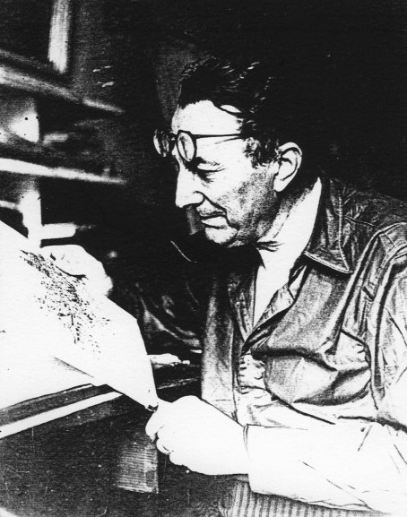 Eduard Hnilička (1887-1967), český architekt, fotograf a grafik